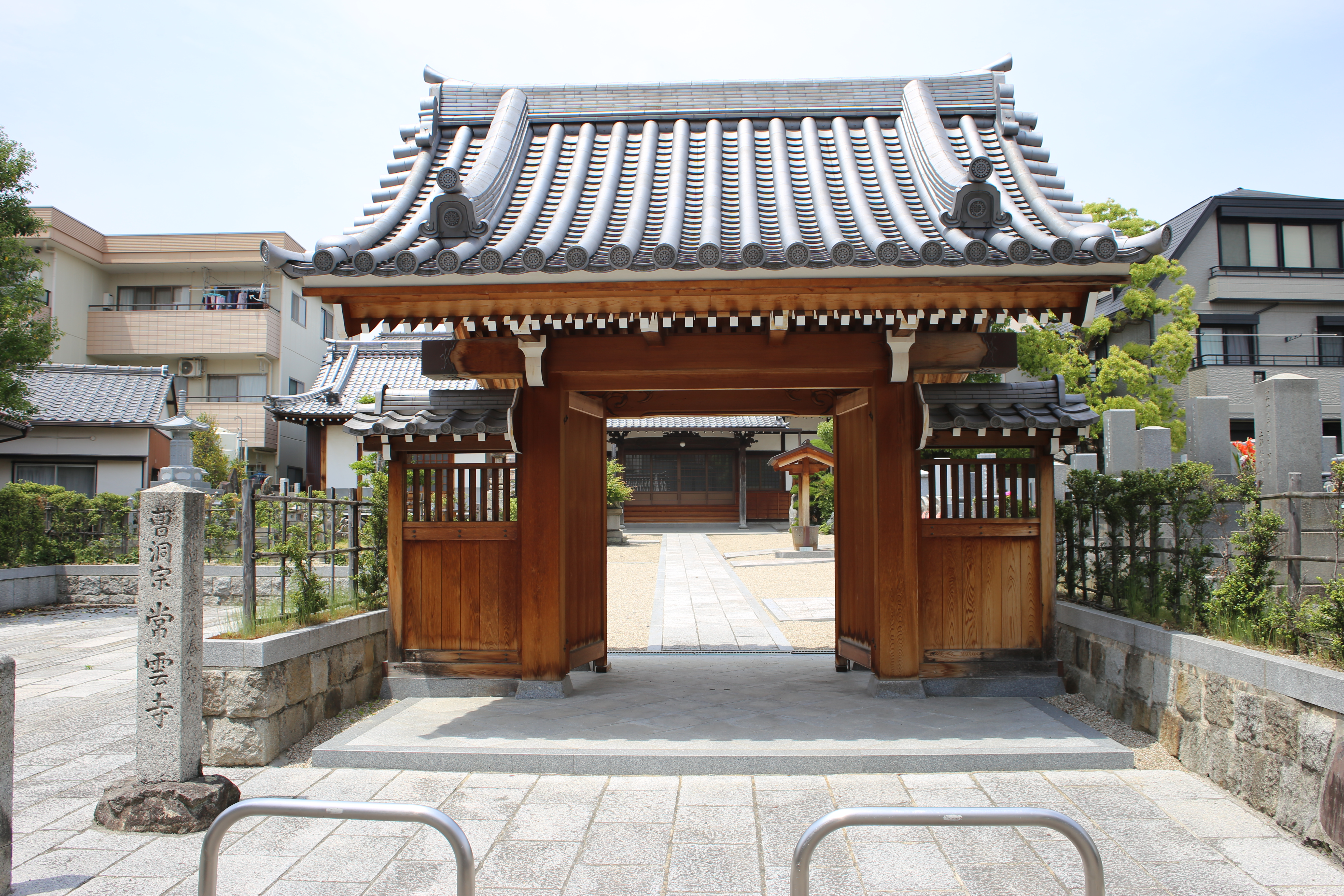 名古屋市守山区幸心の曹洞宗常雲寺